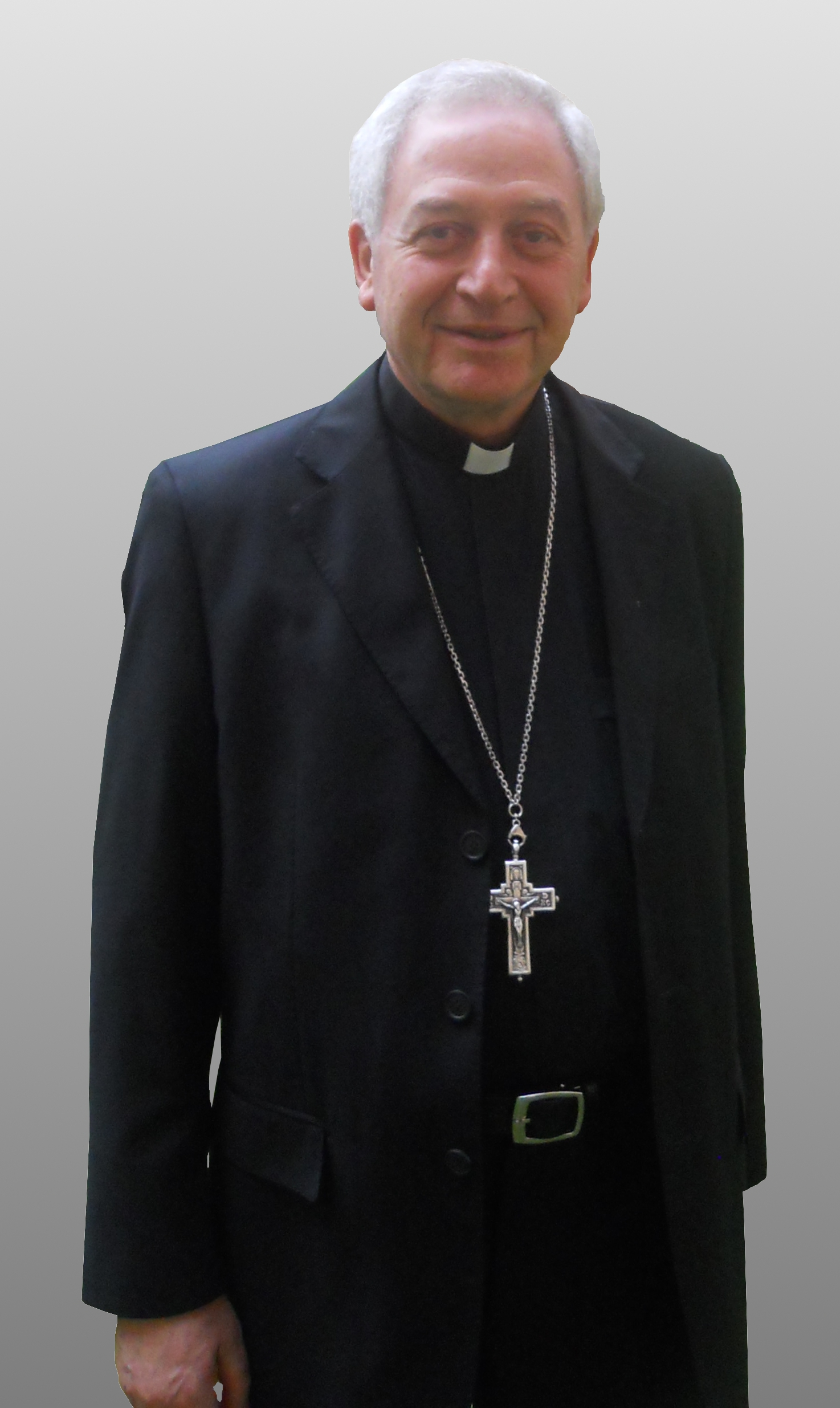 Mons. Salvatore Ligorio, arcivescovo di Matera-Irsina